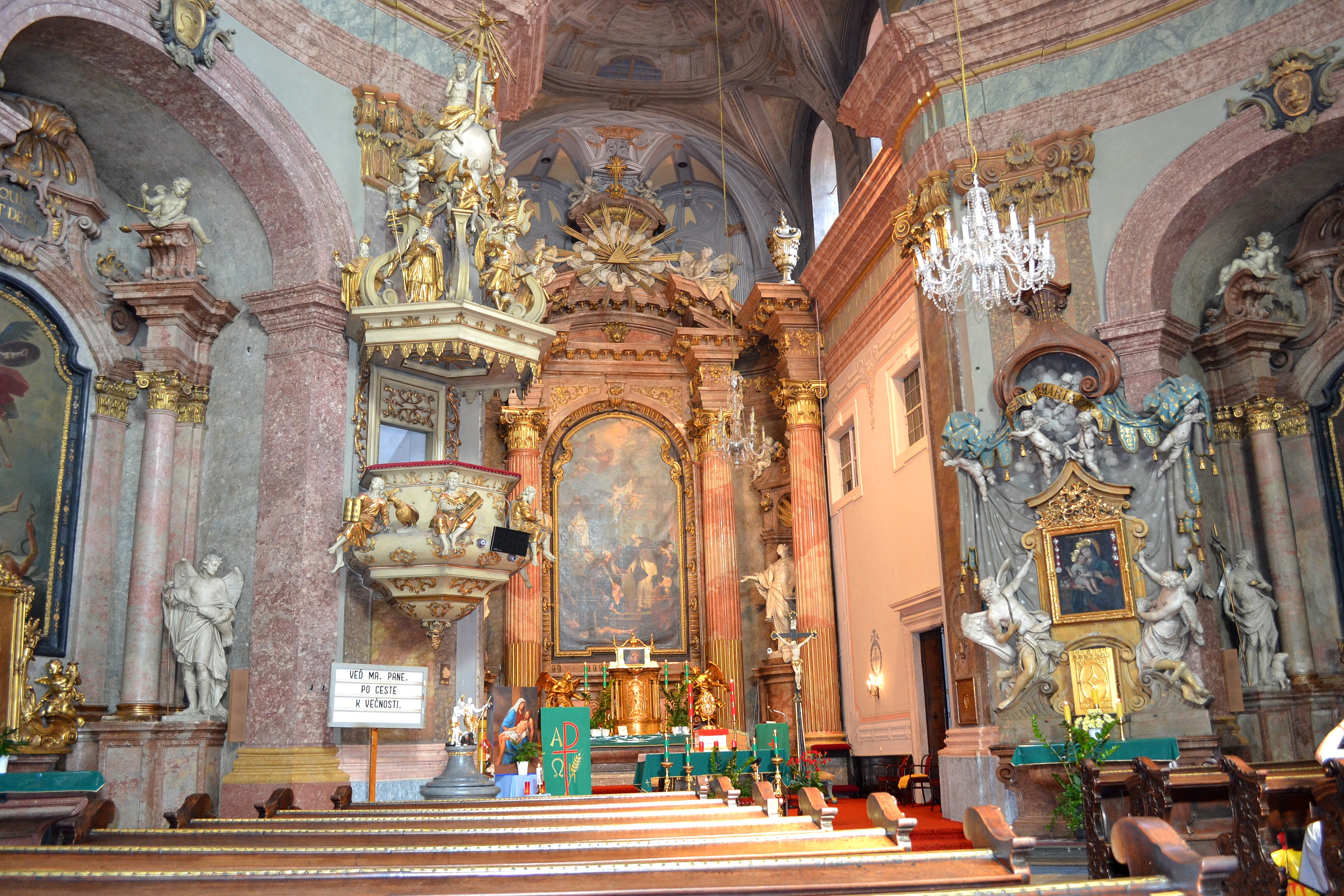 Pohľad do interiéru kostola